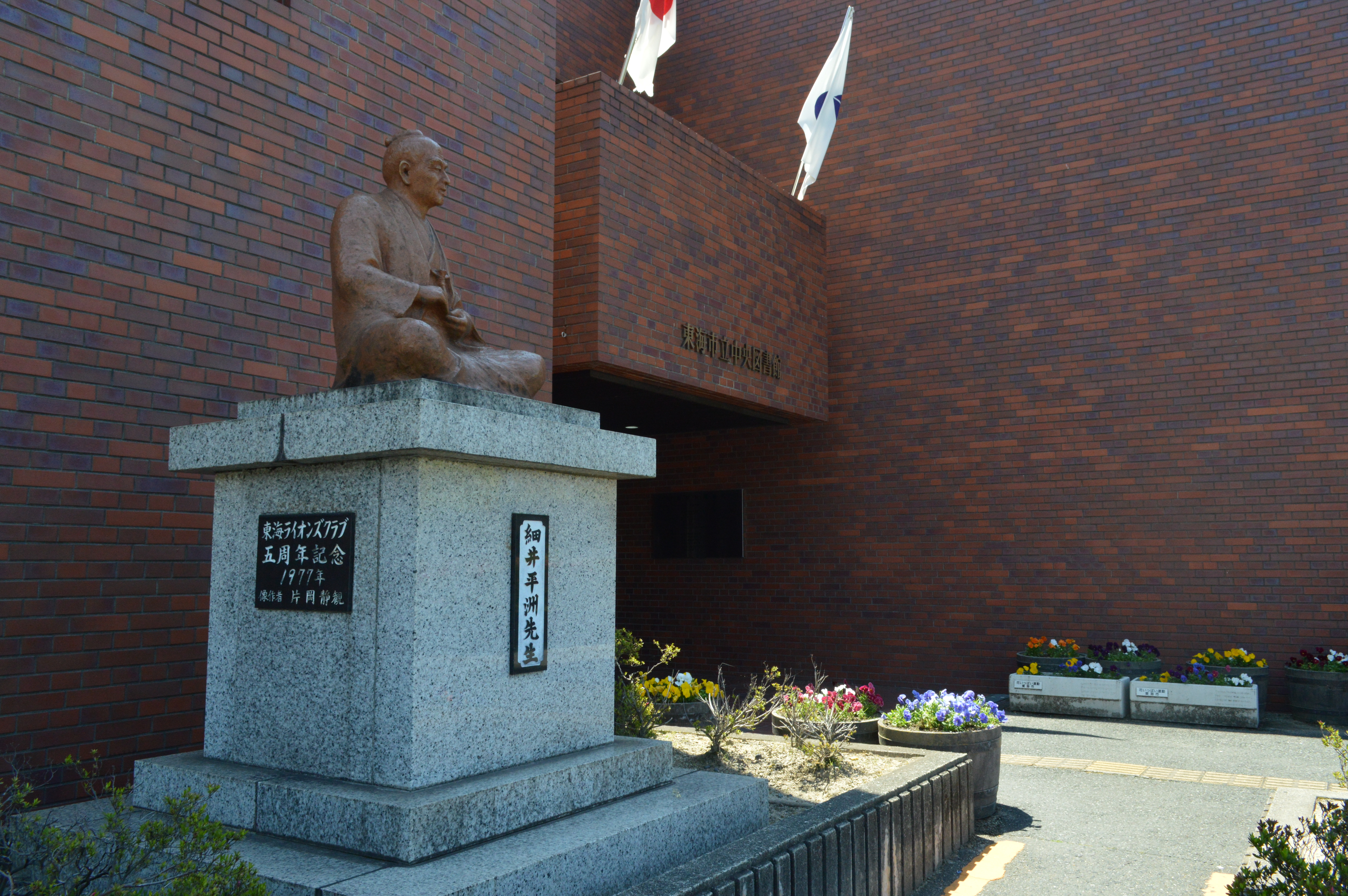 愛知県東海市にある東海市立中央図書館。